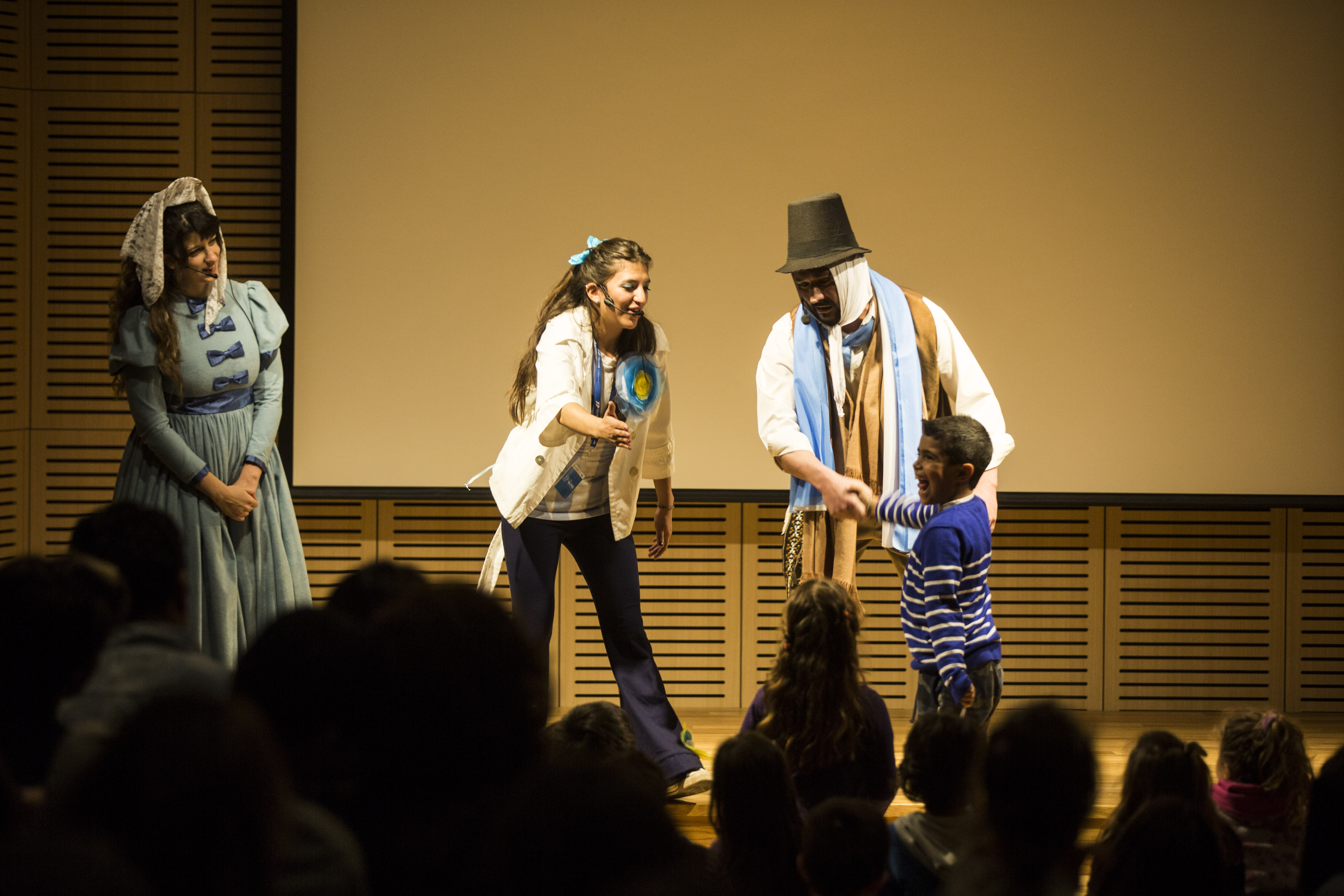 Buenos Aires, 16 de agosto de 2015 - En el marco del "Día del Niño" se realizaron actividades para los más chicos en el Museo Malvina e Islas del Atlántico Sur. Fotos: Mauro Rico/ Ministerio de Cultura de la Nación